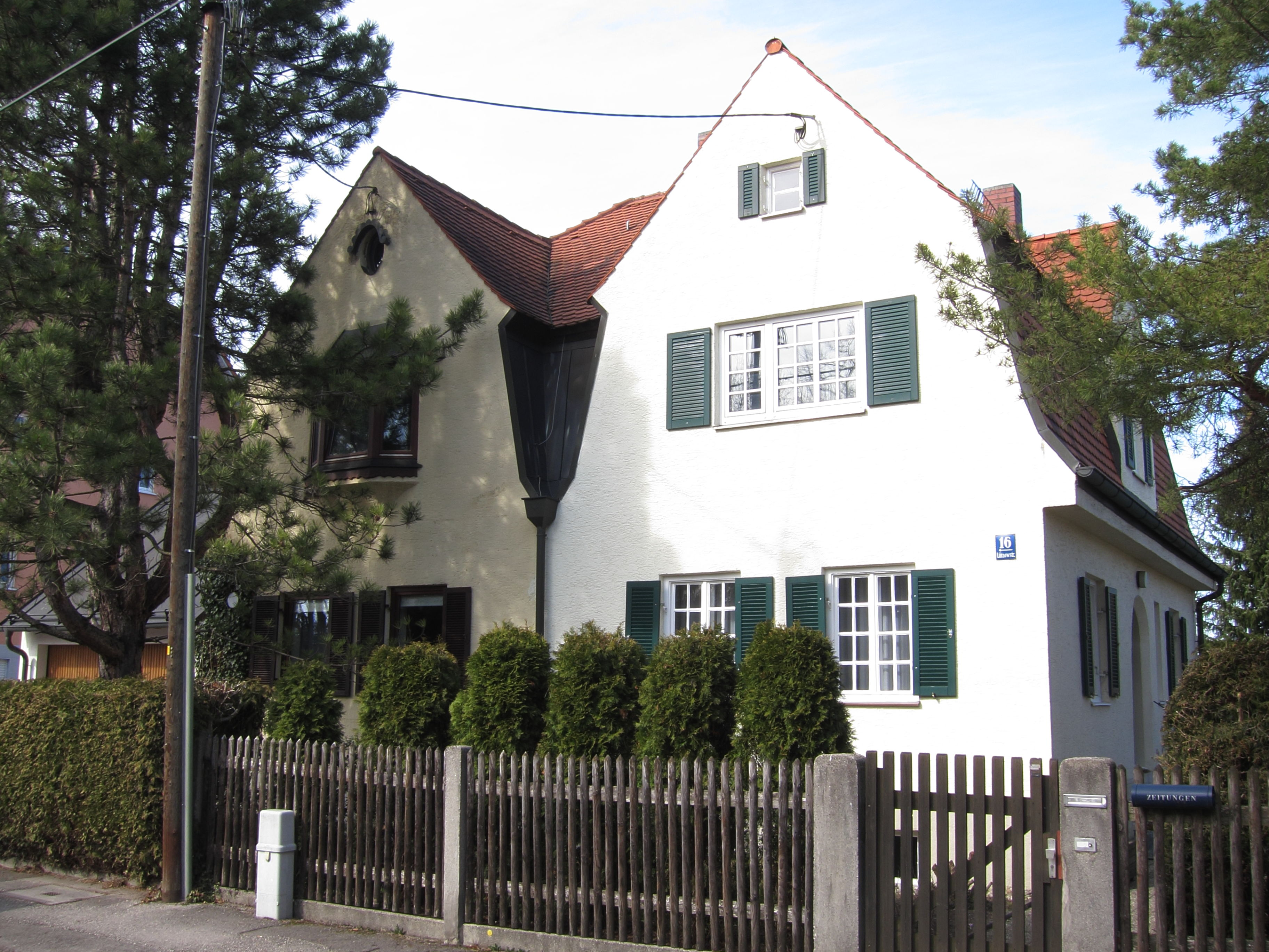 Lützowstraße 16/18; Doppelvilla, 1911 von den Gebrüdern Ott.